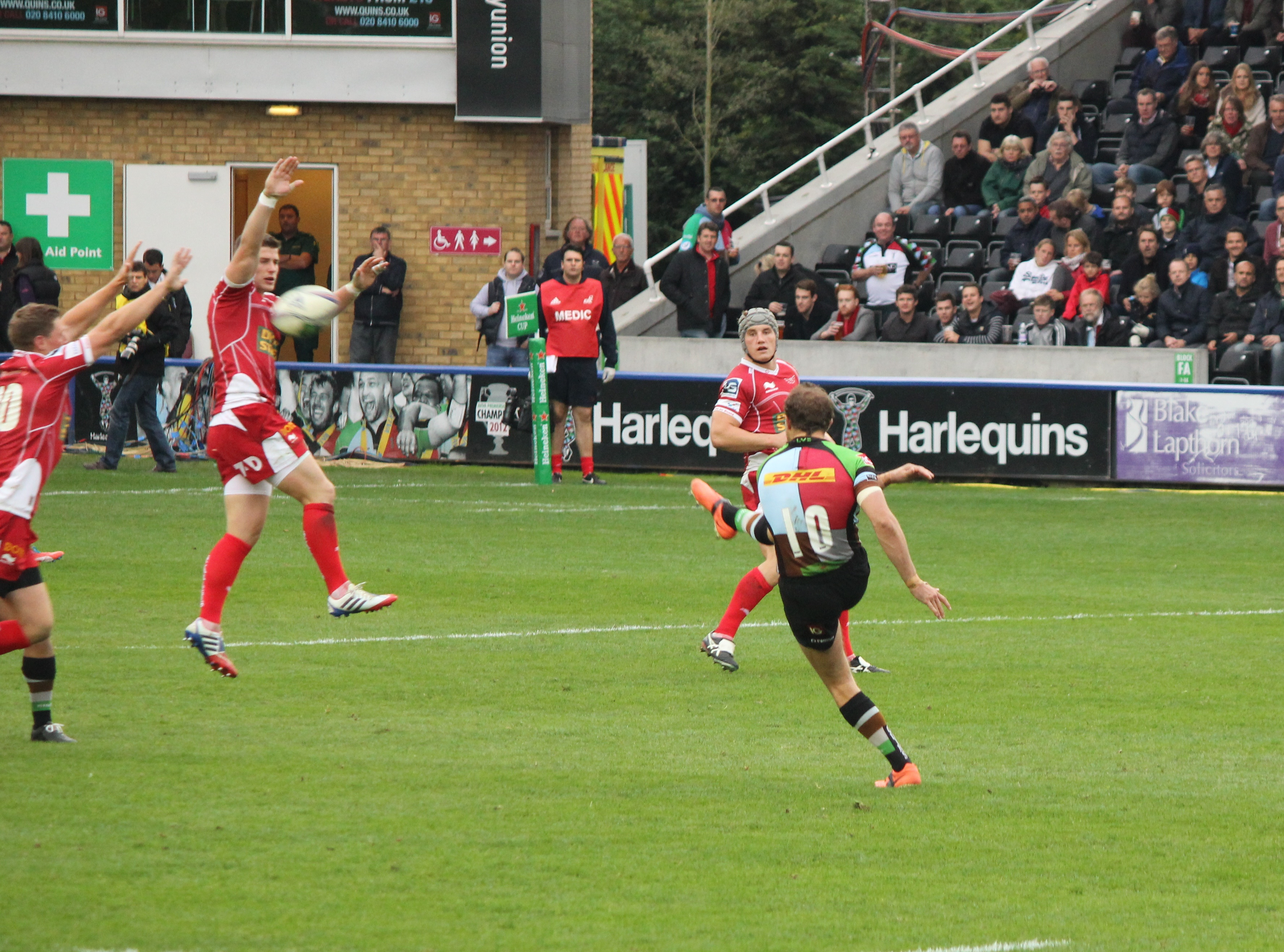 Nick Evans Drop Goal Heineken Cup 2013-14, 12 October 2013, Twickenham Stoop. Match between: Harlequins - Scarlets